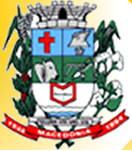 Brasão de armas de Macedônia - SP.